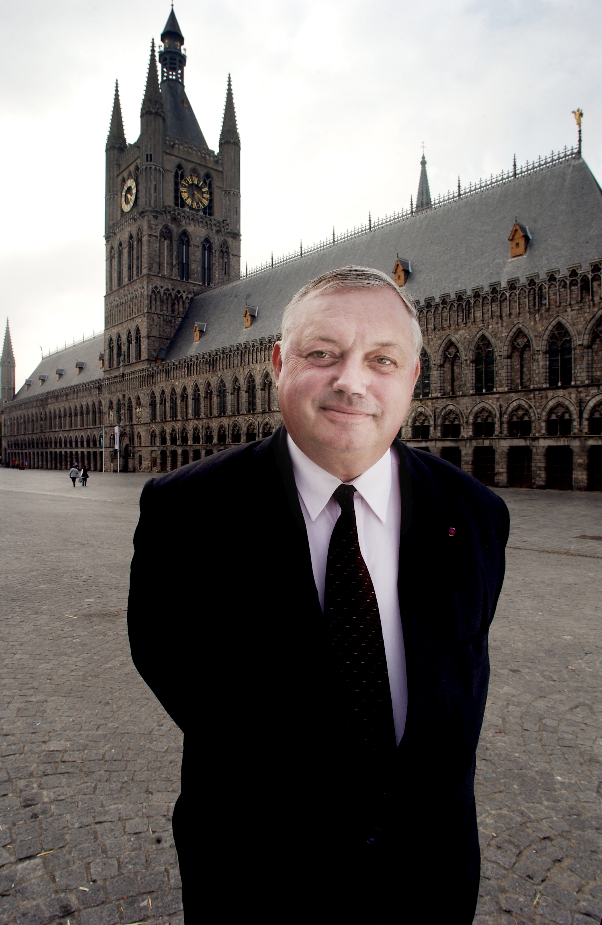 Paul Breyne, Vlaams politicus (CD&V) op de Grote Markt van Ieper.